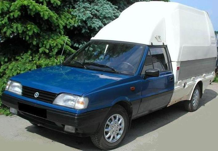 FSO Polonez Truck LB z lat 1993-1997.